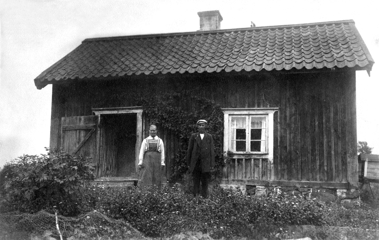 Ålsta båtsmanstorp, Järfälla kommun, Stockholms län. Även kallat Lill-Ålsta eller Ålsta torp. Låg under Ålsta gård. Framför byggnaden står Johan August Pettersson med hustrun Augusta Maria, född Fahlstedt.